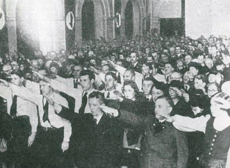 Zborovanje Kulturbunda januarja 1941 v Celju. V sredini spredaj (v civilni obleki) voditelj Kulturbunda v Sloveniji senior Johann Baron.